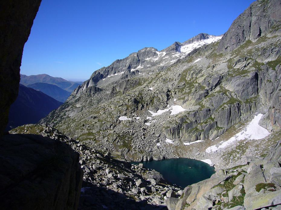 Estany Cloto i Massís de Comalestorres; la Vall de Boí, Alta Ribagorça, Catalonia